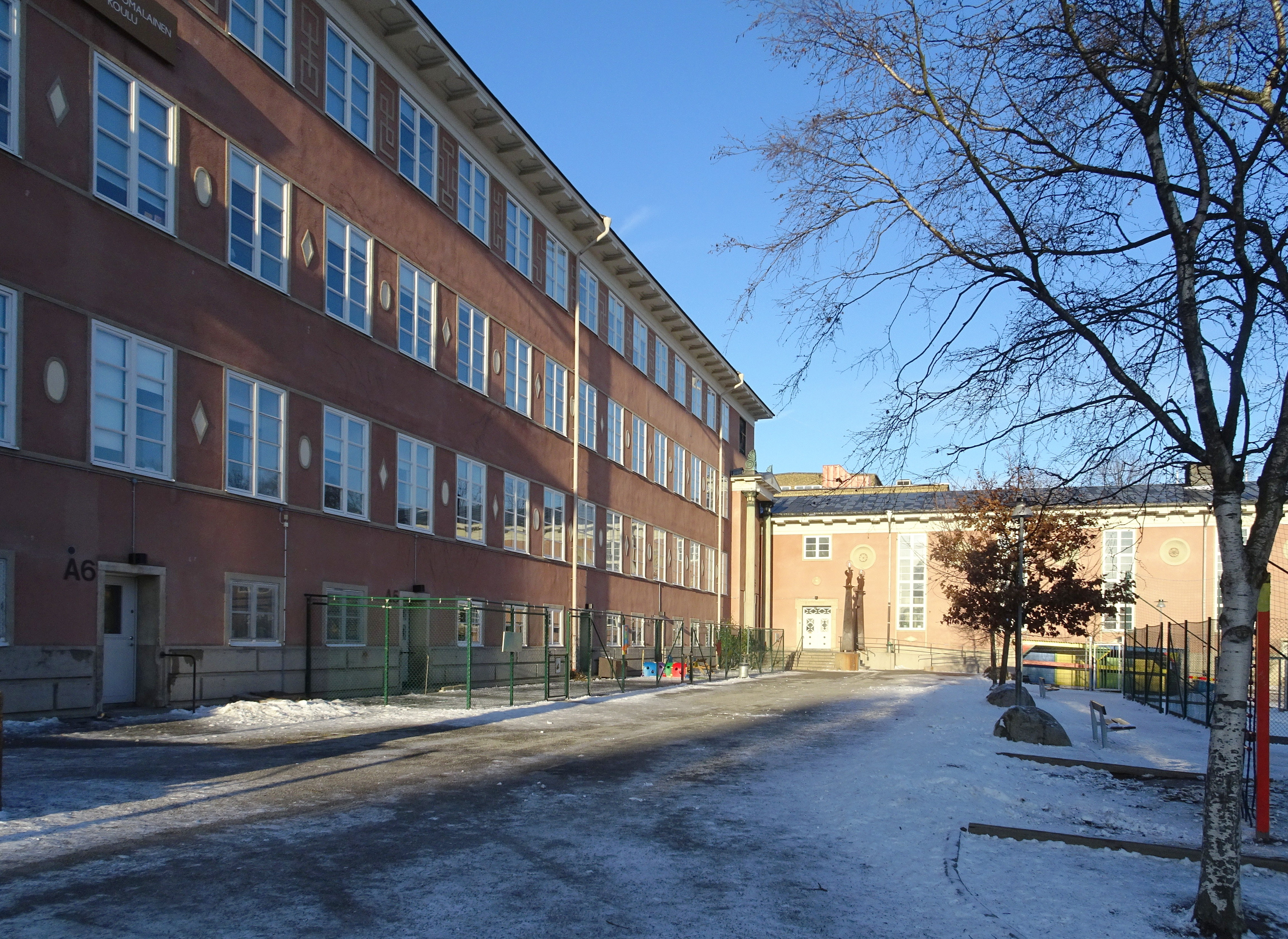 Sverigefinska skolan i Stockholm (före detta Fridhemsplans gymnasium, ursprungligen Norra kommunala mellanskolan), arkitekt Georg A. Nilsson